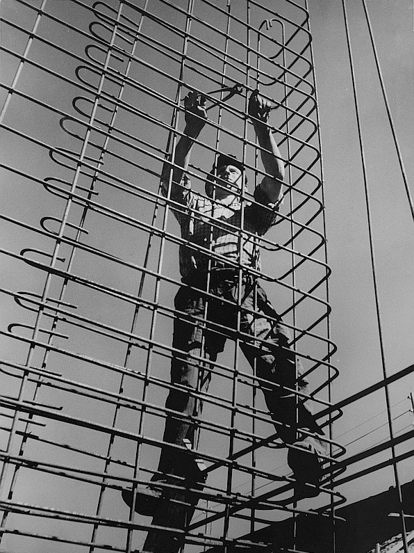 Original image description from the Deutsche Fotothek Montage von Bewehrungselementen aus Rundstahl